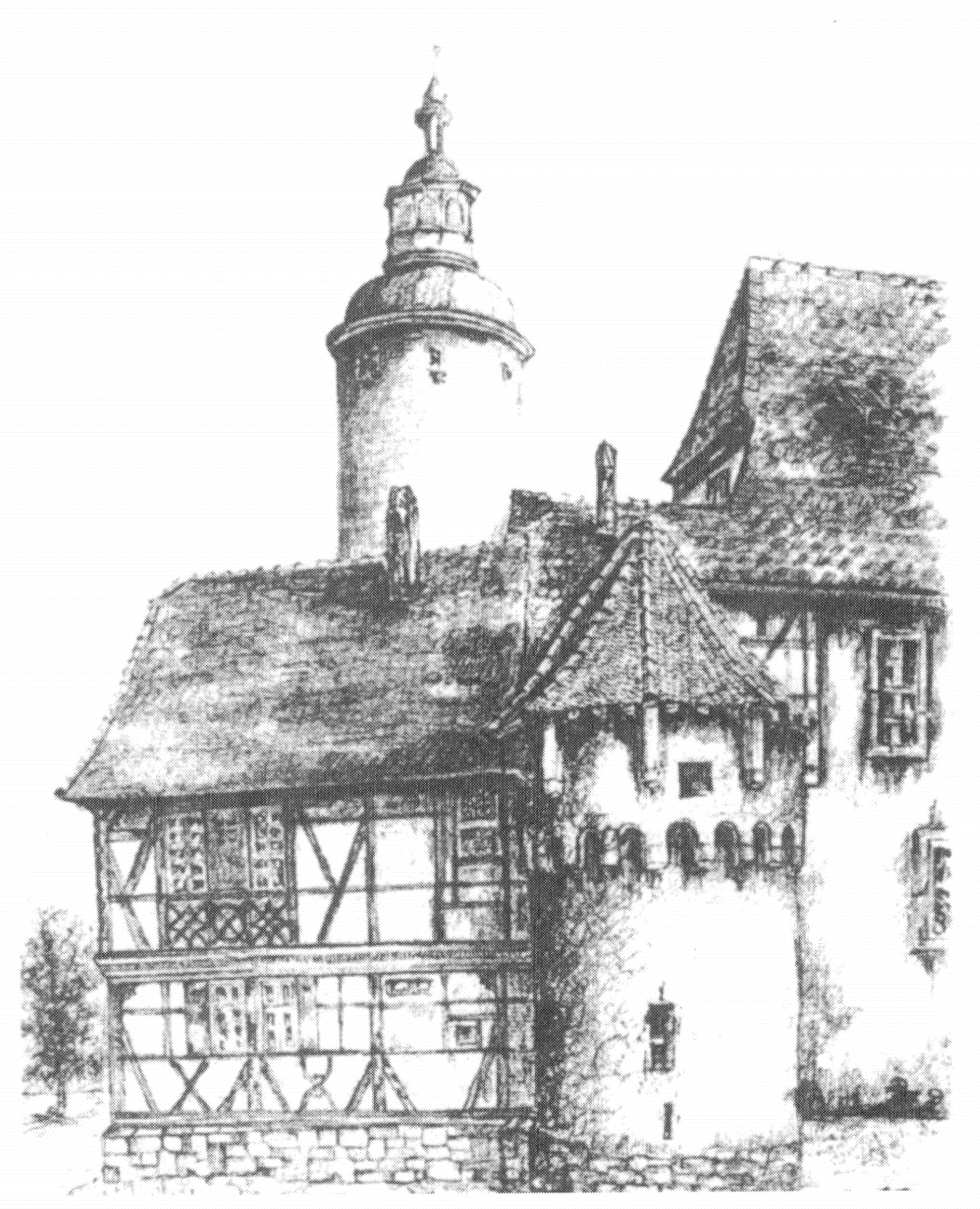 KSTBB Handelslehranstalt im Kurmainzischen Schloss Tauberbischofsheim, ehemaliges Schulgebäude der Kaufmännischen Schule Tauberbischofsheim. Für die Schulchronik 1997, Kaufmännische Schule Tauberbischofsheim